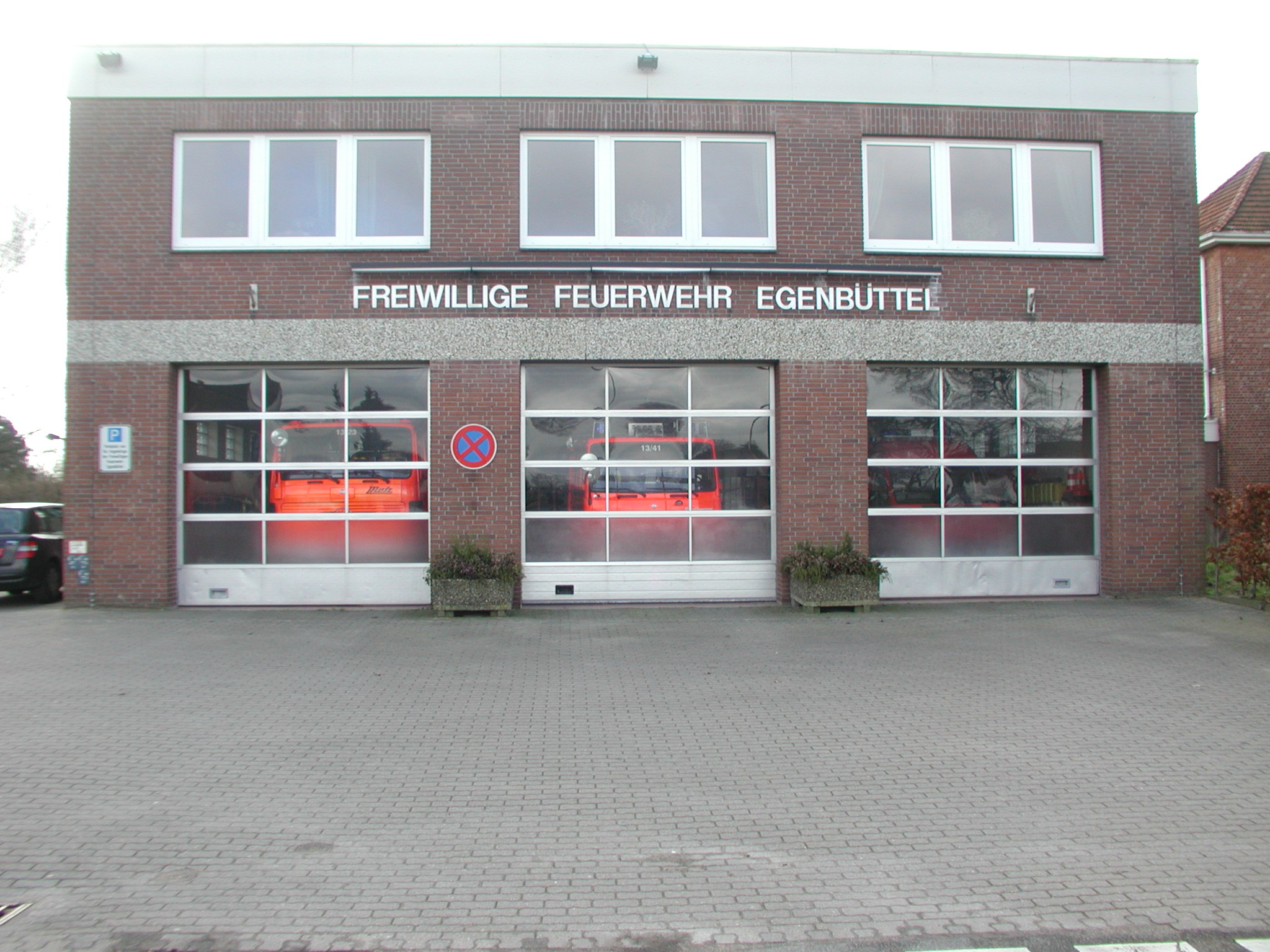 Rellingen, Egenbüttel,Pinneberger Straße 56, Feuerwehrgerätehaus